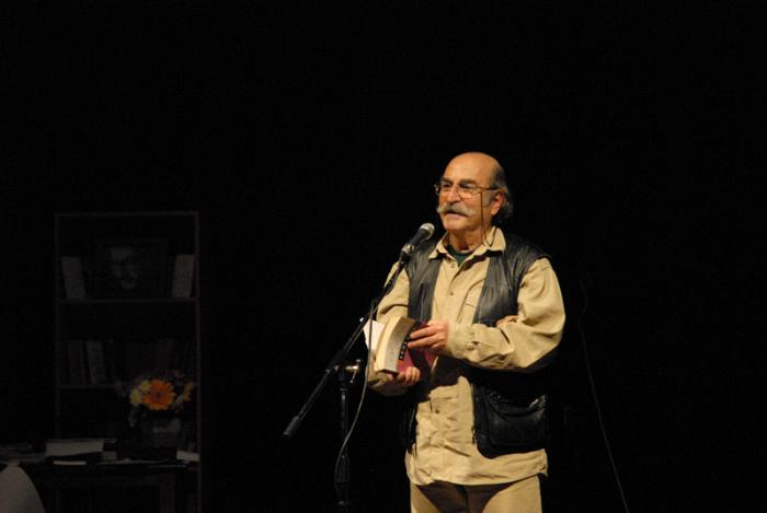 Yılmaz Onay Nazım Hikmet Kültür Merkezi'nde konuşma yaparken